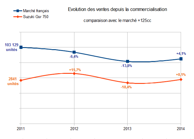 Évolution des ventes du modèle GSR 750 de Suzuki depuis sa sortie. Comparaison avec le marché français. Tableau réalisé avec LibreOffice